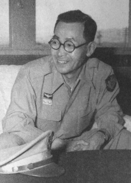 筒井竹雄